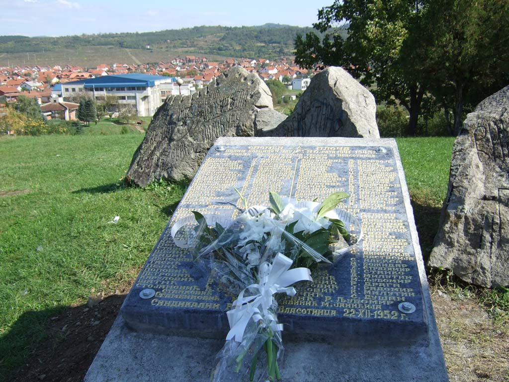 Спомен плоча палим борцима и жртвама Другог светског рата. Власотинце, старо гробље.